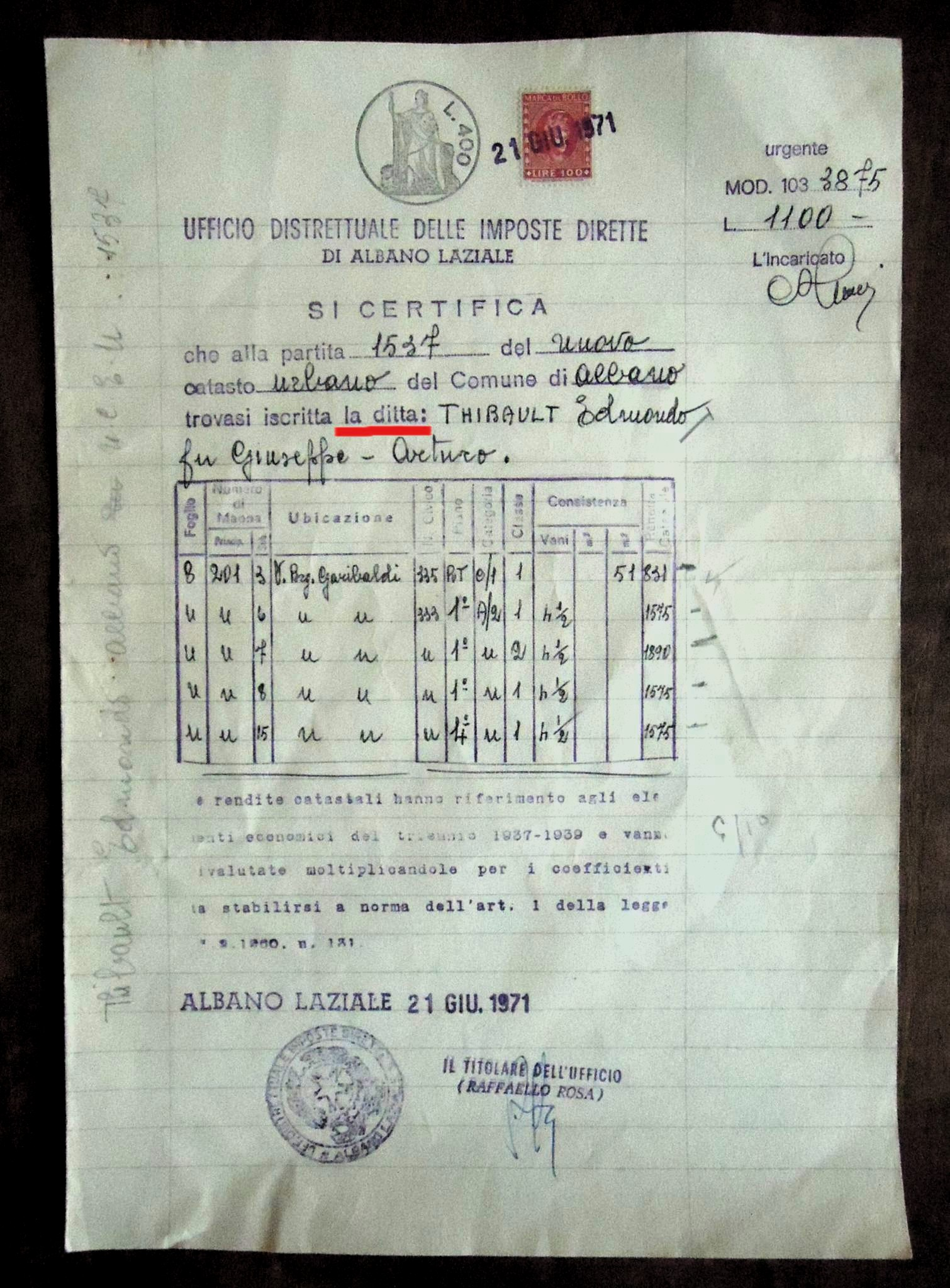 Ditta Thibault